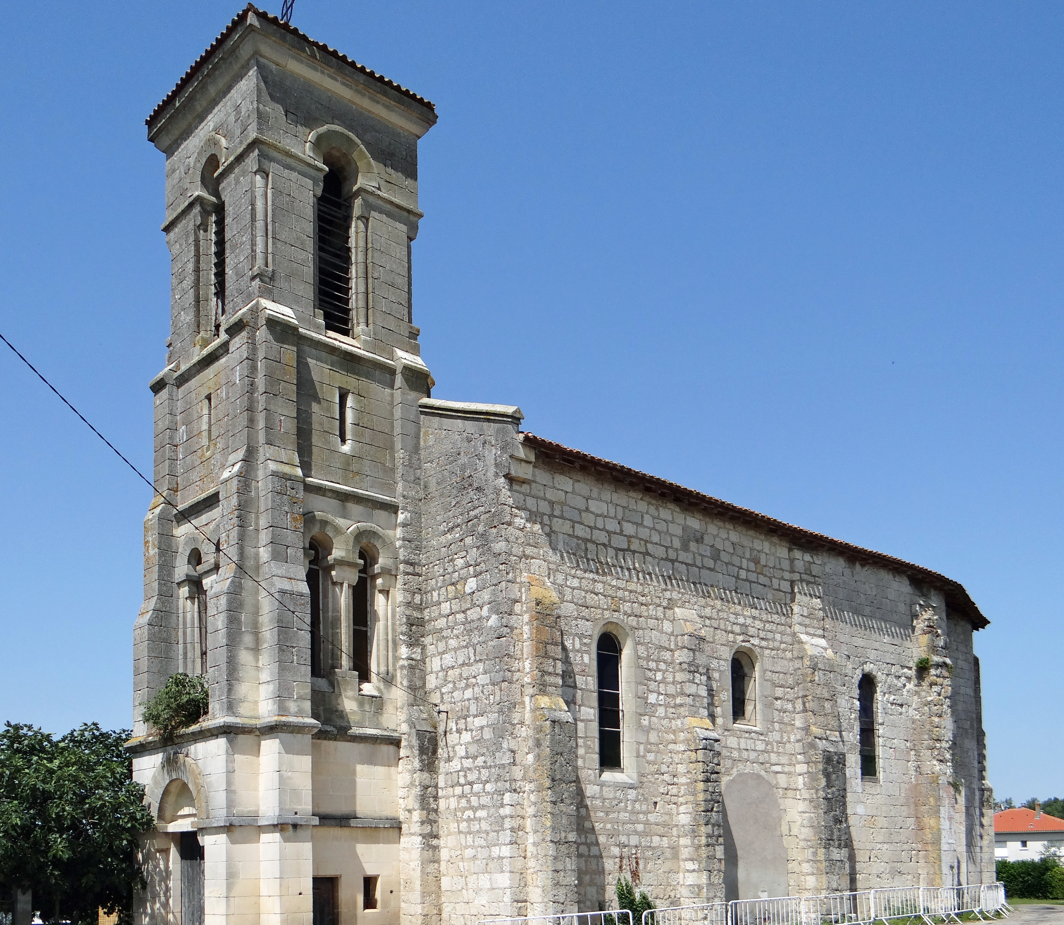 Aiguillon - Église Saint-Côme